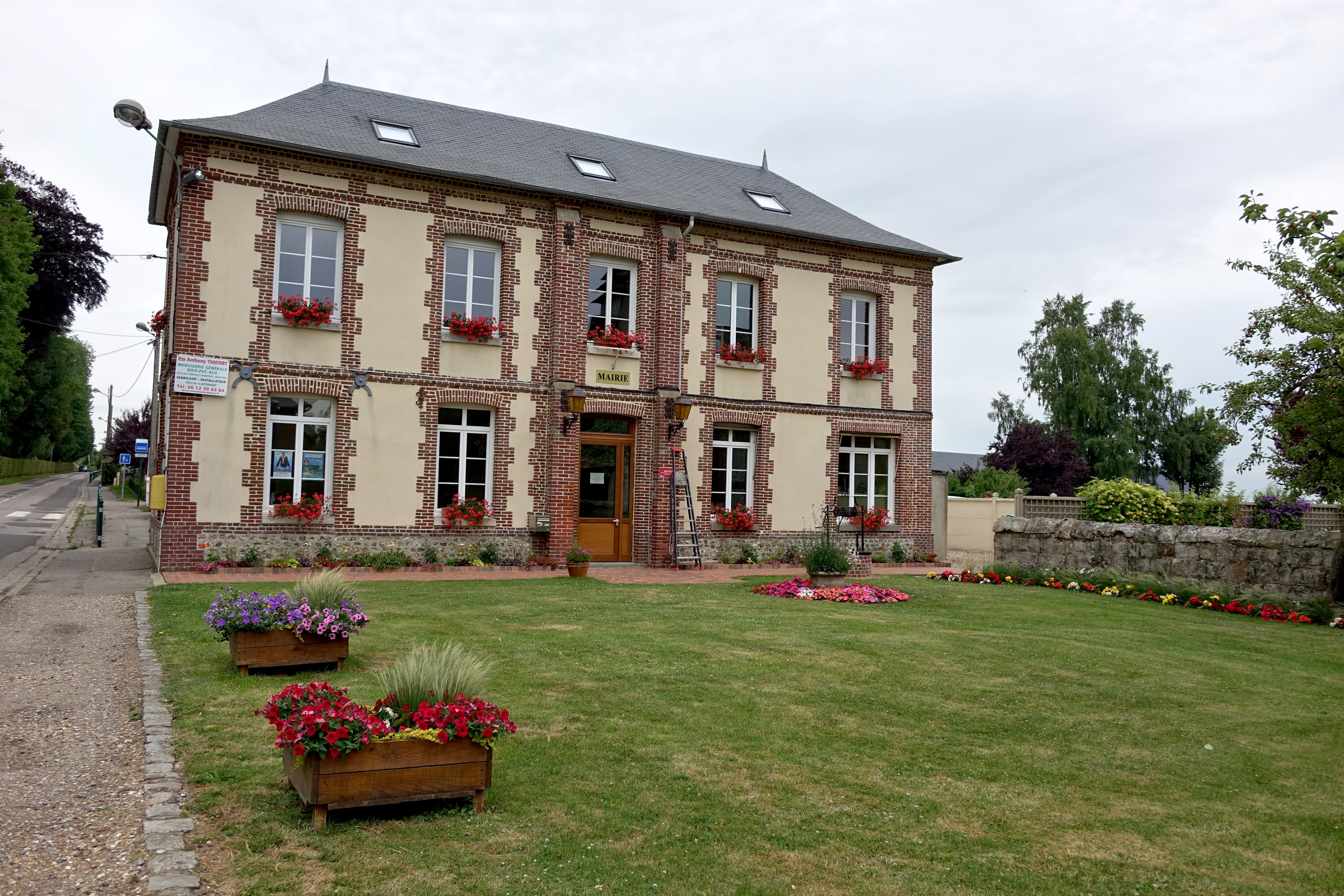 Mairie de La Vieux-Rue, Seine-Maritime, France